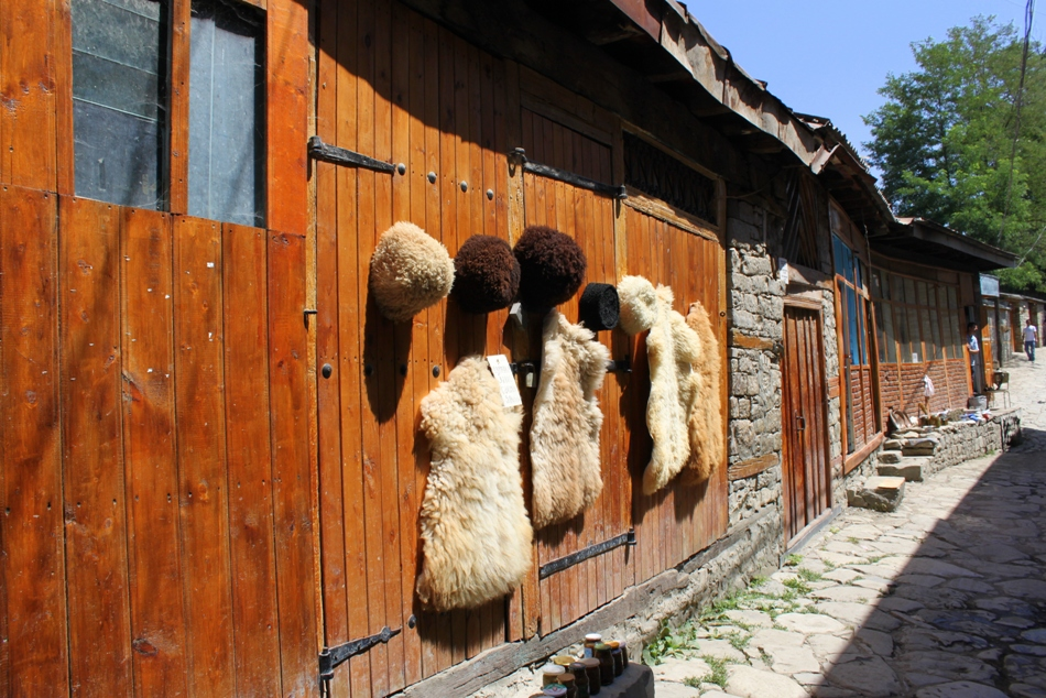 Село Лагич, Исмаиллинского района Азербайджана.